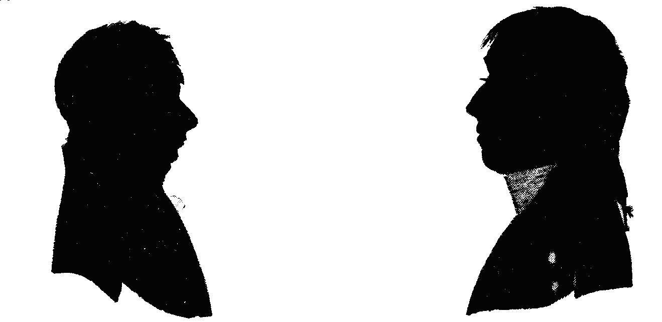 Zwei Silhouetten der Hallenser Theologiestudenten Johann Daniel Kramer († 21. Juni 1802) und D. C. Kahmann, Consenior und Senior des Corps Saxonia Halle